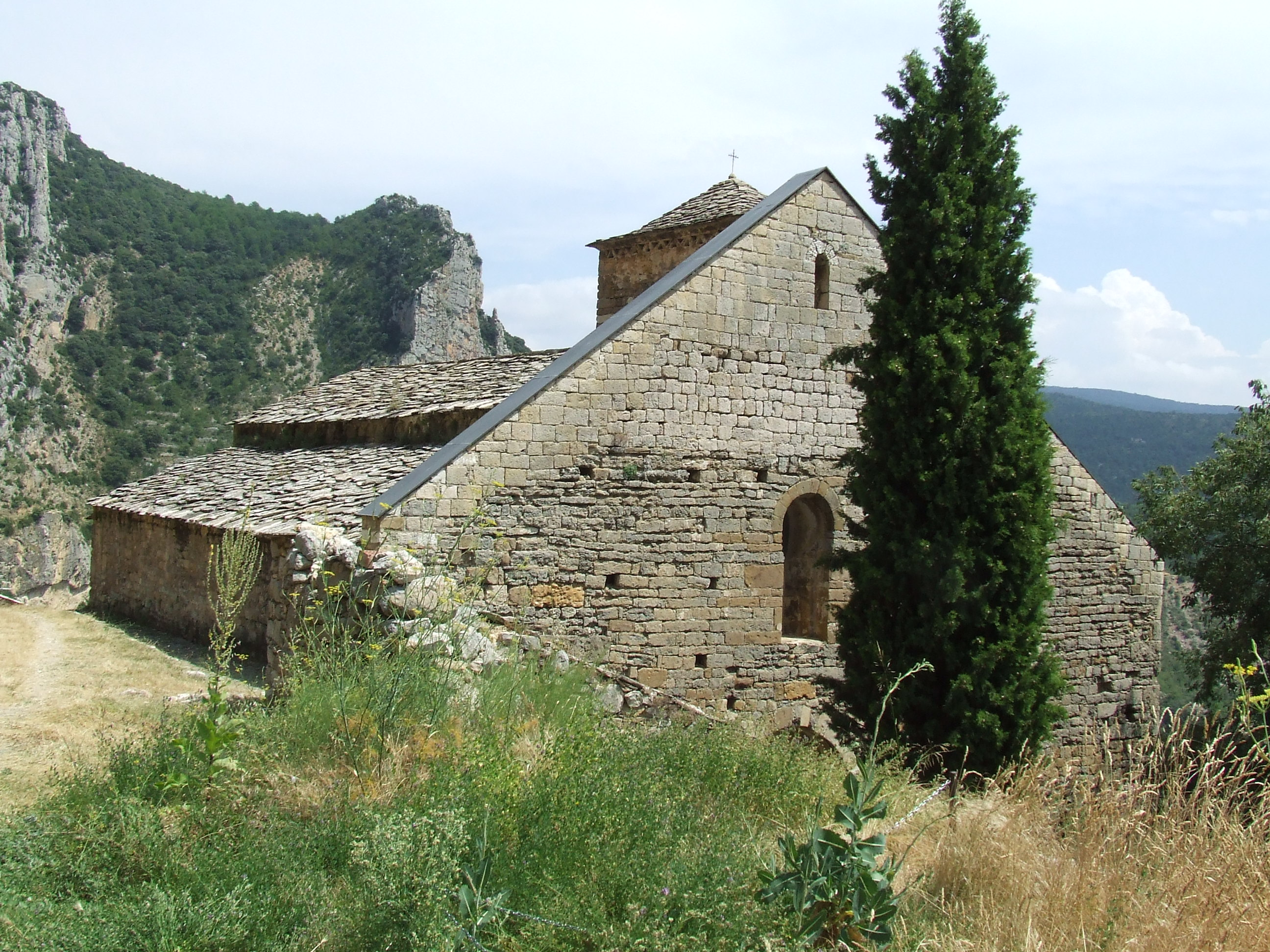 Sant Esteve d'Abella de la Conca (Pallars Jussà)